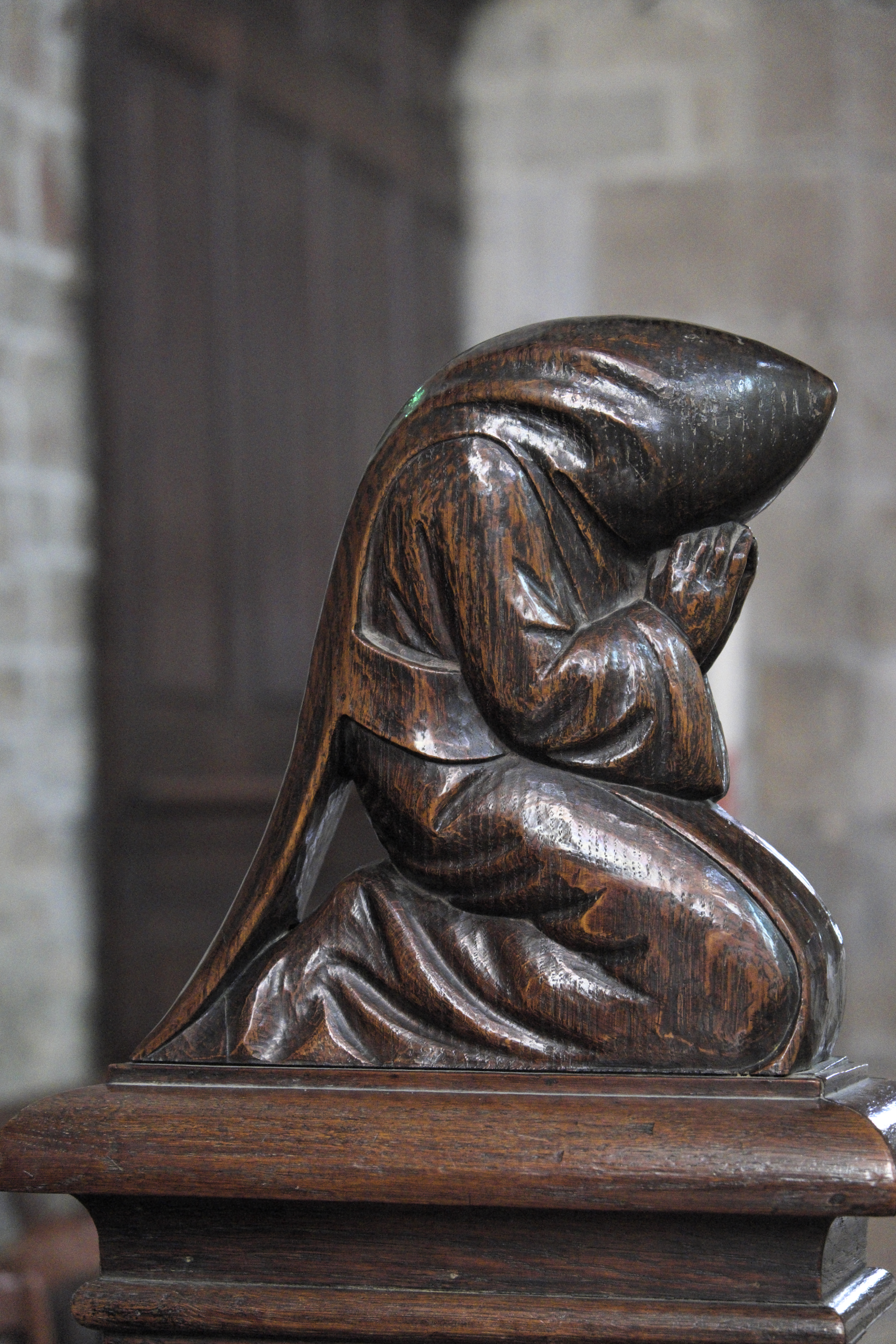 Basilika Notre-Dame-de-l'Assomption in La Guerche-de-Bretagne im Département Ille-et-Vilaine (Bretagne/Frankreich), Skulptur des Chorgestühls: Betender Mönch